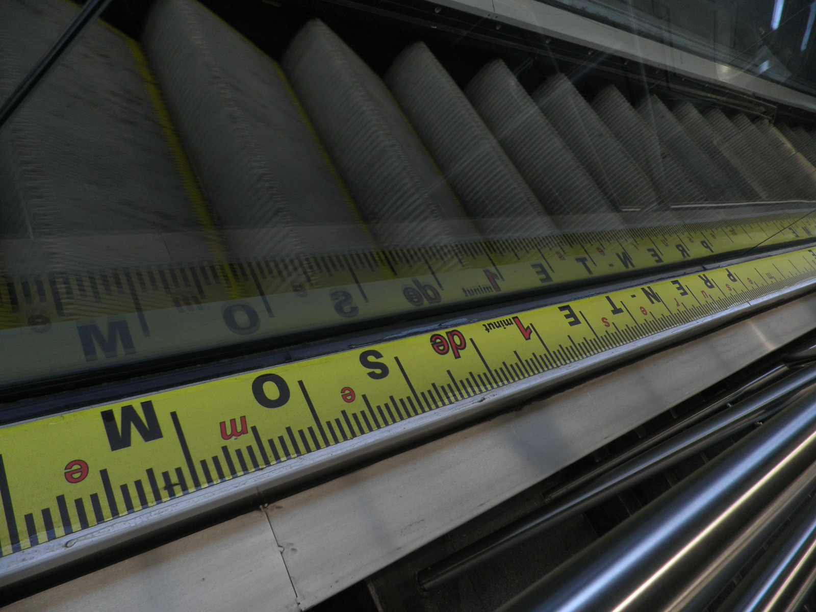 Mesures d'emergència d'Antoni Abad (Llèida 1956). Intervenció artística instal·lada l'any 2010 a la Línia 5 del Metro, estacions de Vall d'Hebron (d'on és la fotografia), Carmel i El Coll- La Teixonera (Barcelona)